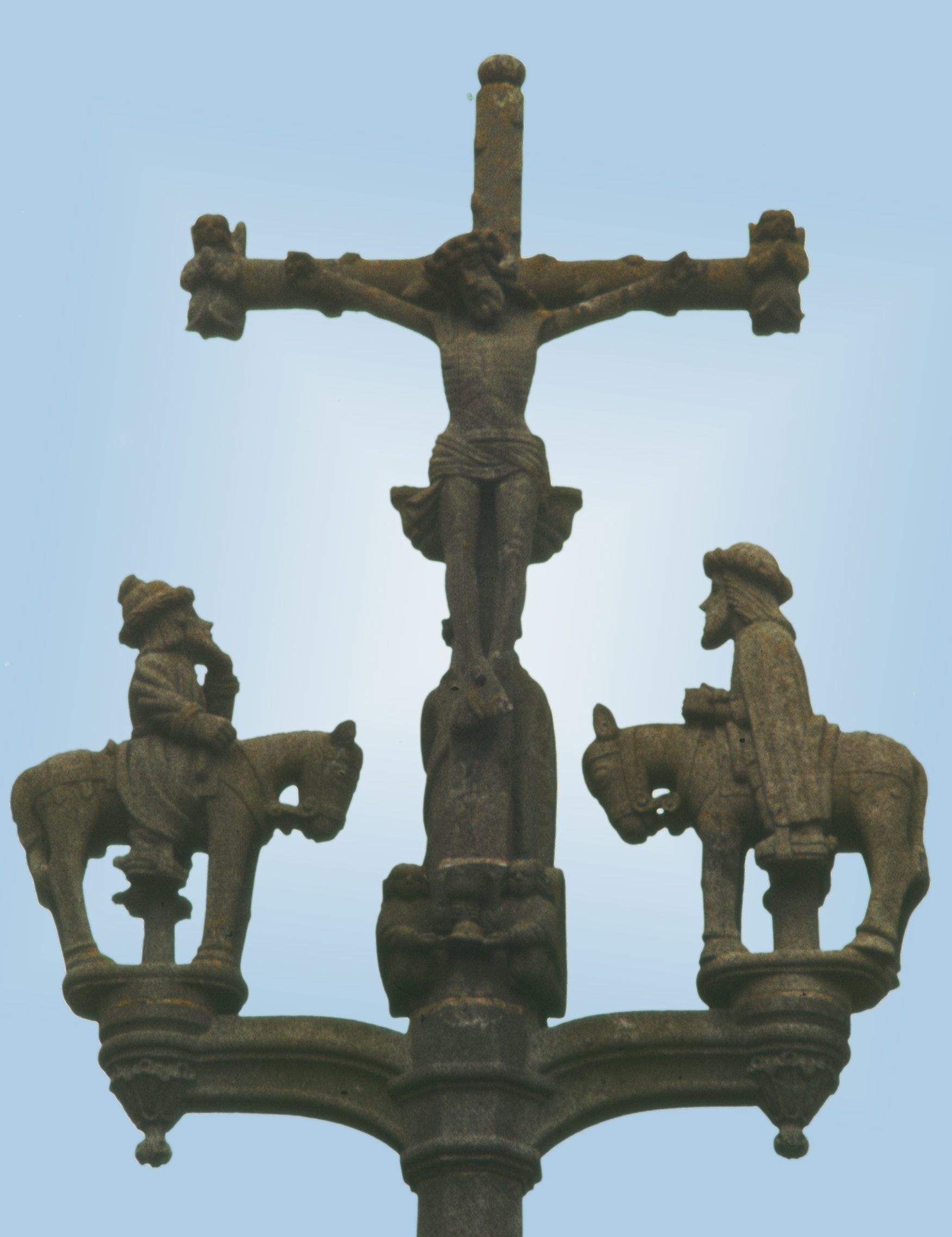 Calvaire de Plougastel-Daoulas